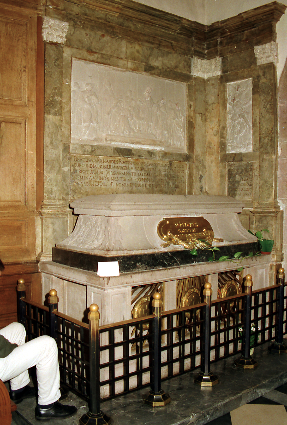 Odilienberg - Sarkophag der heiligen Odilia in der Grabkapelle